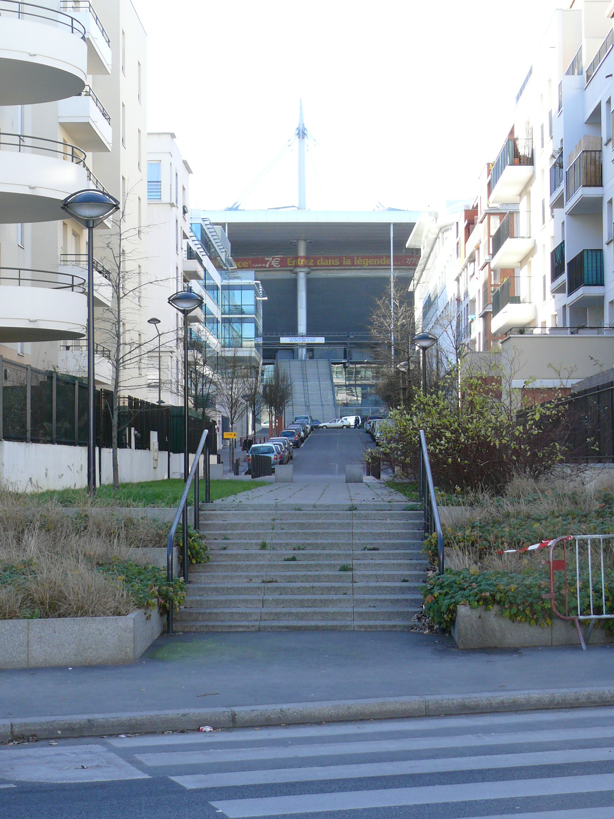 Saint-Denis, rue Micheline_Ostermeyer. Au fonds, le Stade de France